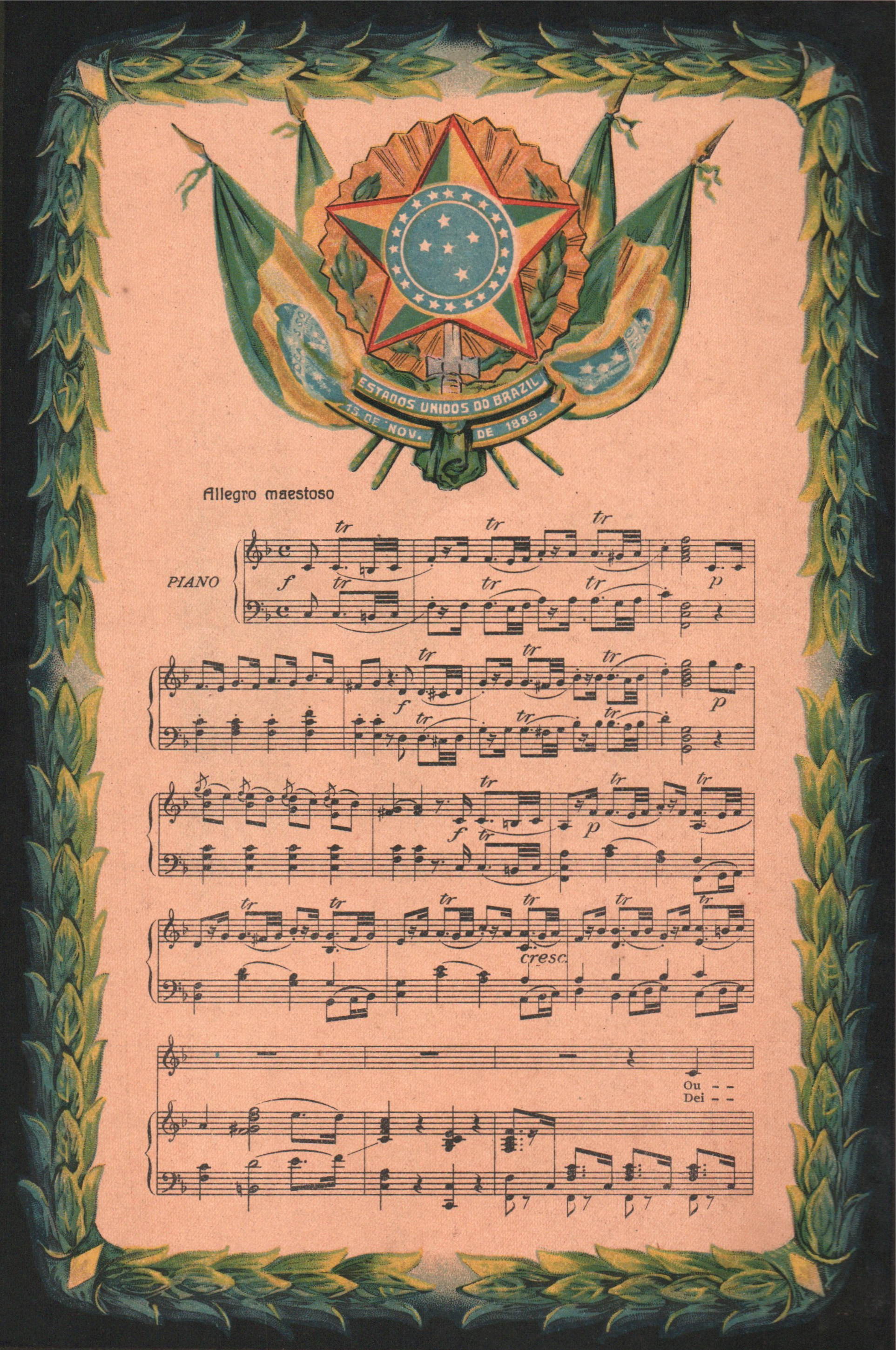 Símbolos nacionais do Brasil: Bandeira, o Brasão de Armas do Brasil ornamentando a parte inicial do Hino Nacional em forma de partitura para piano em trabalho de Teodoro Braga de 1922.